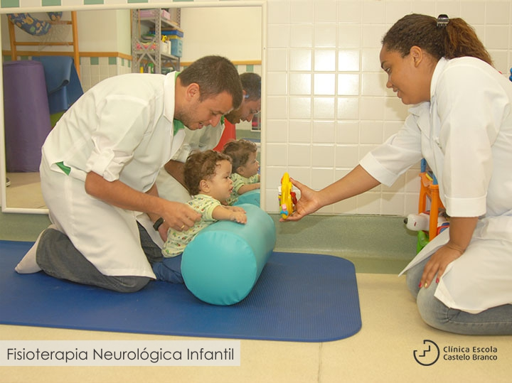 Fisioterapia neurologica infantil clinica escola UCB